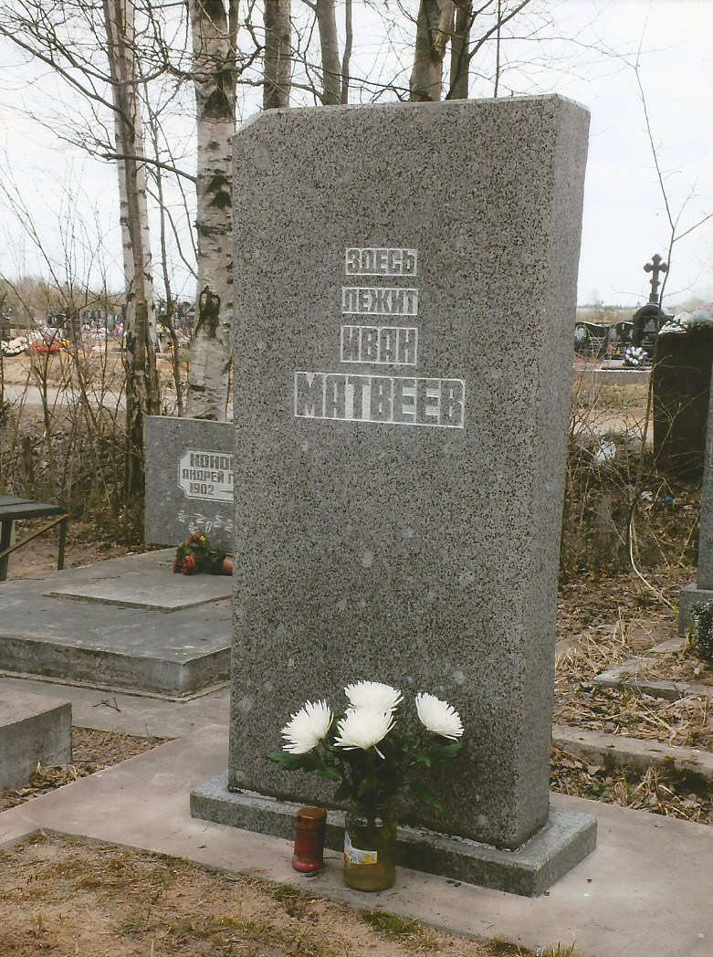 Надгробие на могиле Матвеева Ивана Петровича (1914-1984). Северное кладбище Санкт-Петербурга. Россия.